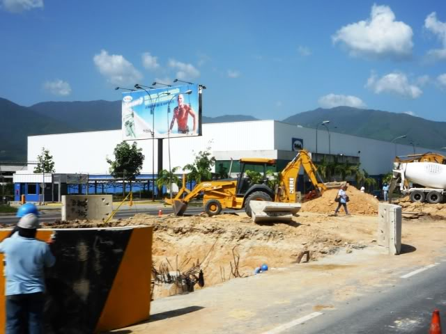 Obras del Metro de Guarenas-Guatire a la altura de Guatire, estado Miranda, Venezuela.